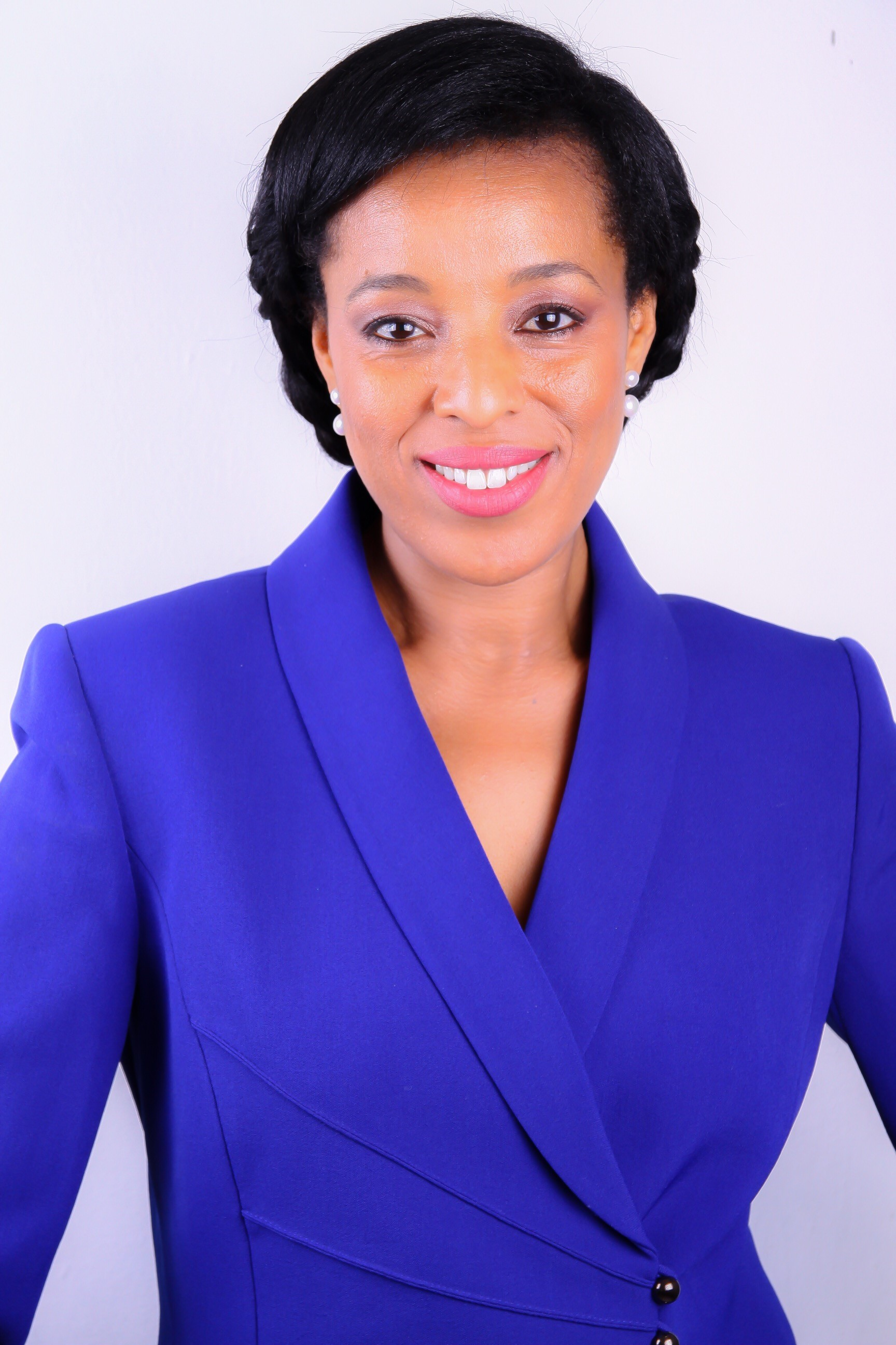 מהרטה ברוך-רון